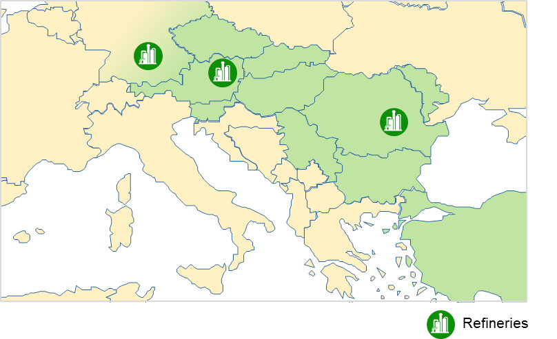 OMV Downstream Oil Portfolio 2017